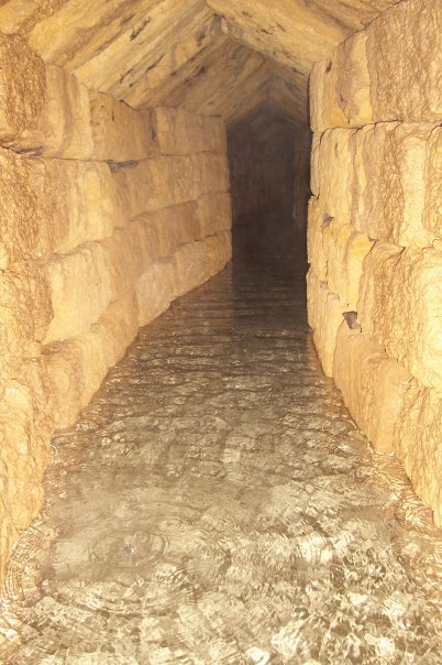 Qanat Gesuiitico Basso in Palermo